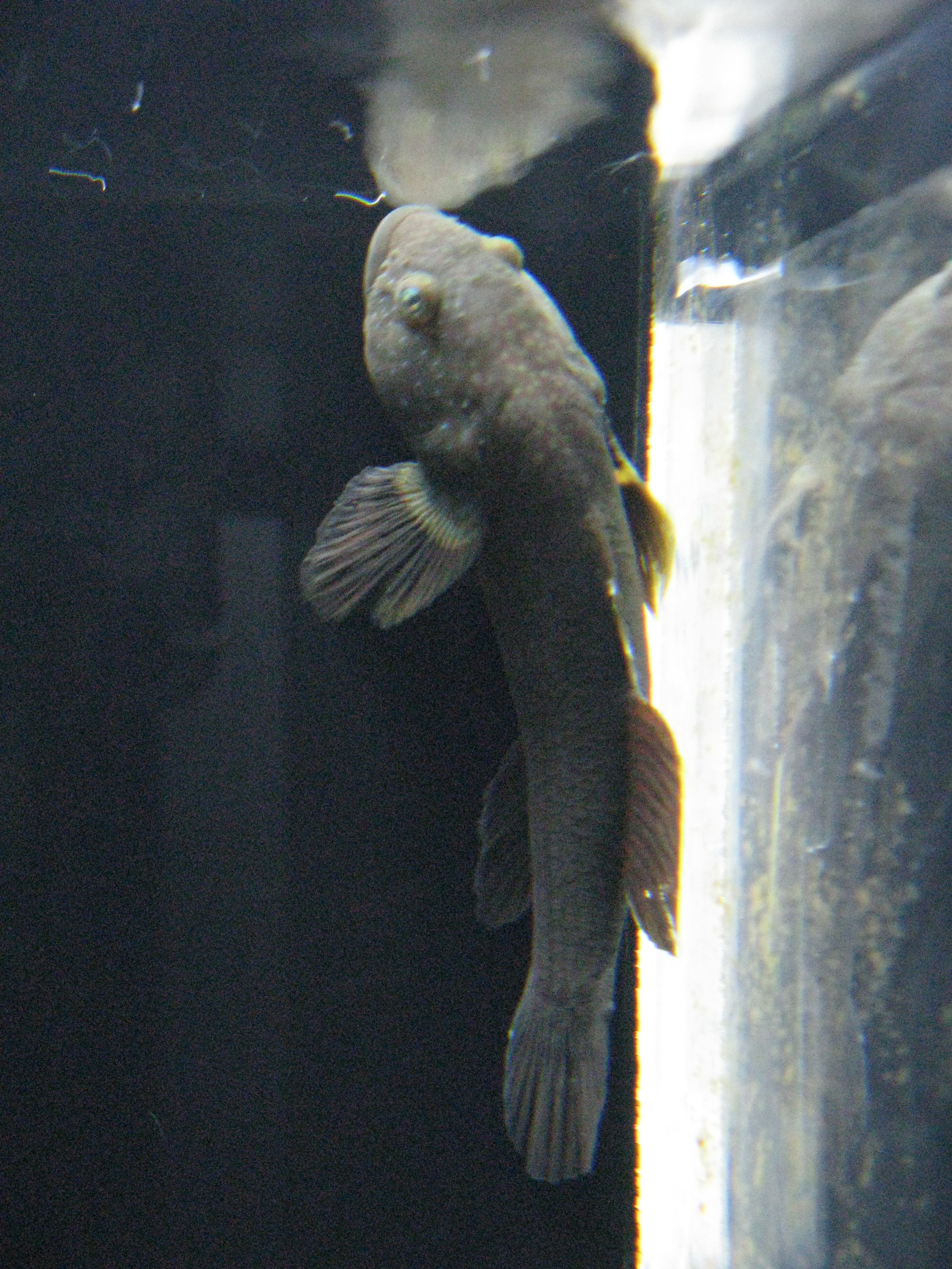 Scientific name Tridentiger brevispinis